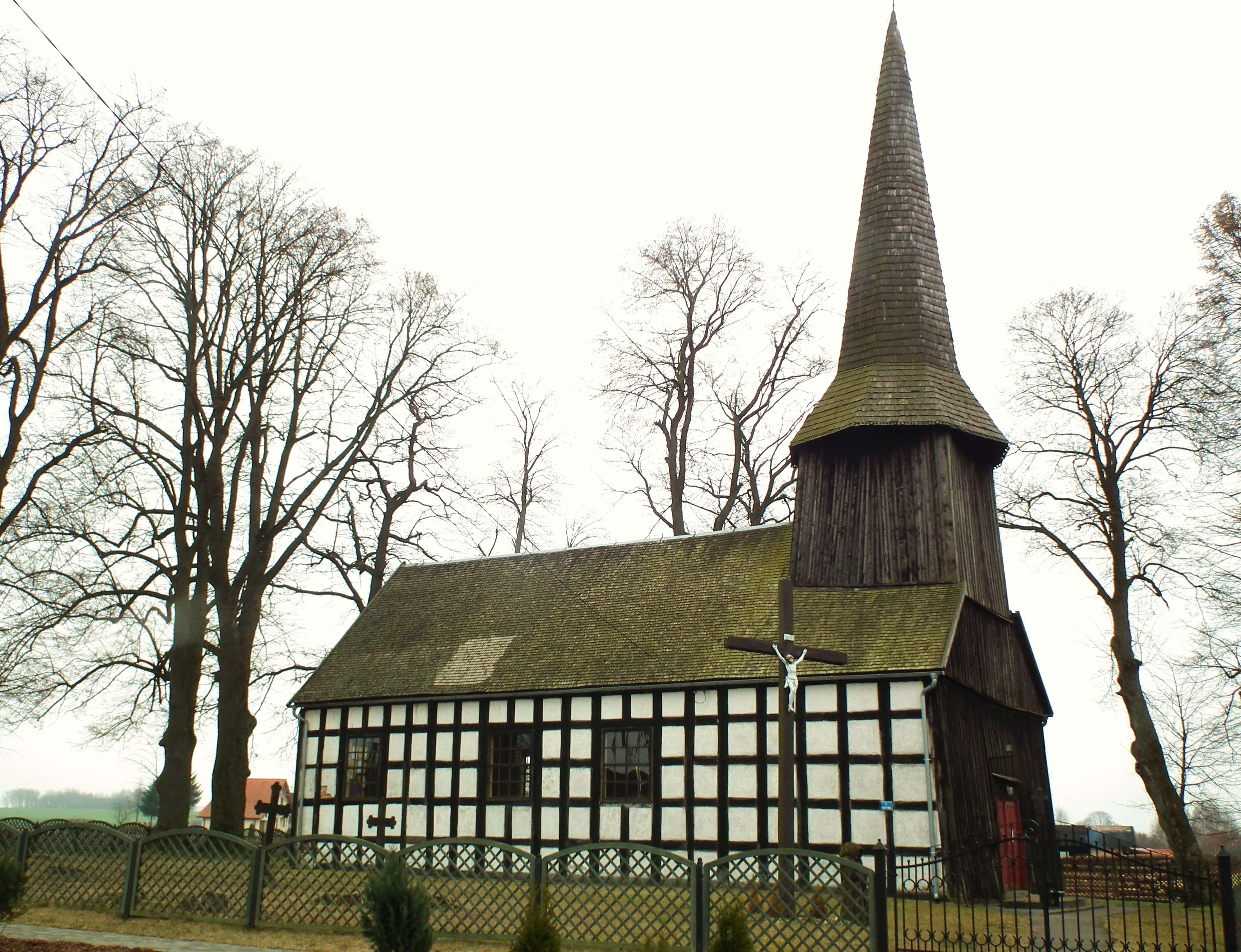 Kościół św. Judy Tadeusza w Sierpowie.